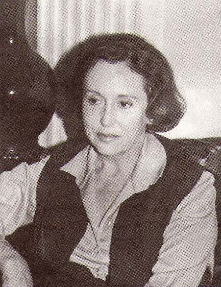 Martha Mercader, escritora argentina